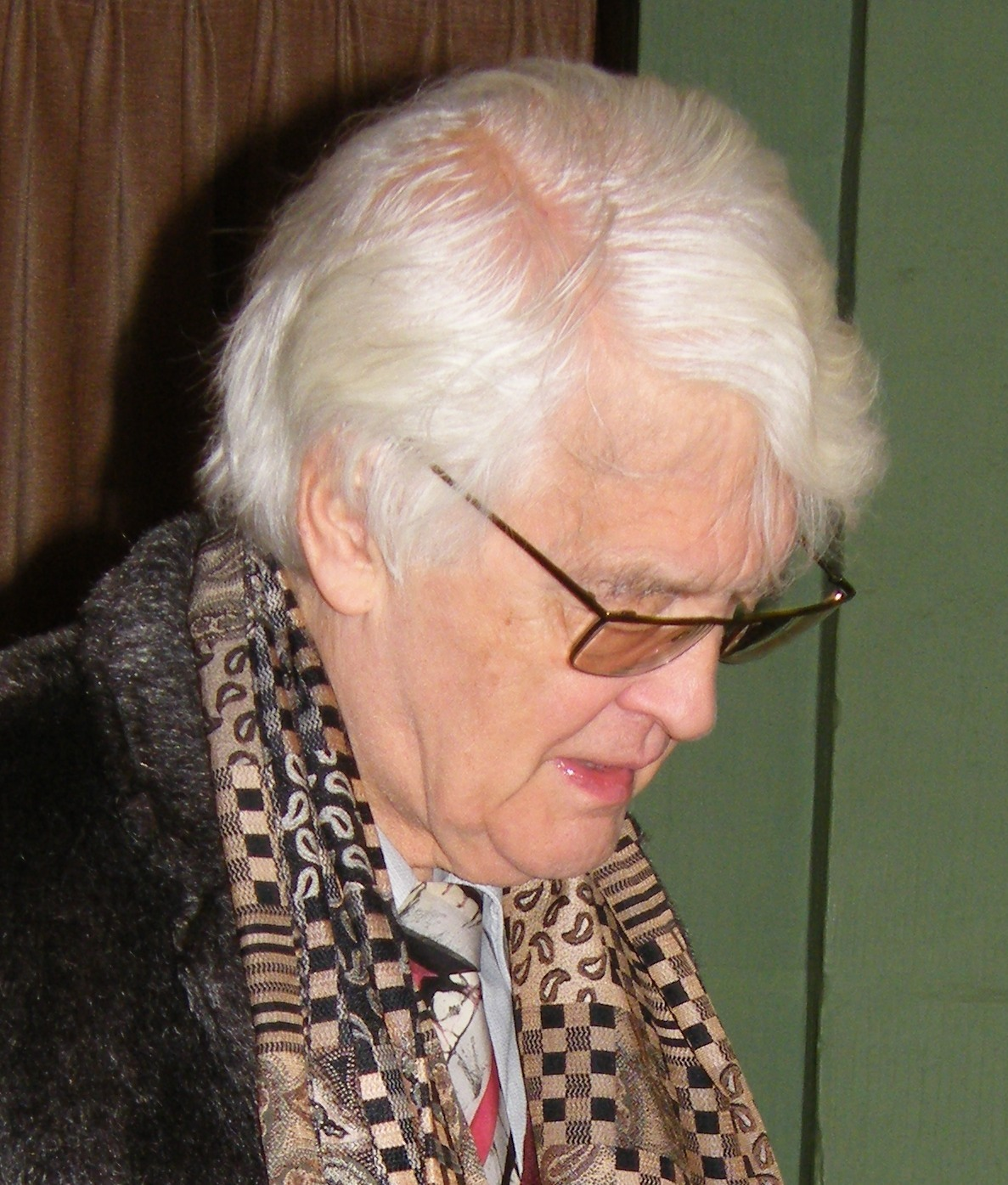 Lothar Schmid bei der 38. Schacholympiade in Dresden 2008 in der "World of Chess", dem Rathaus